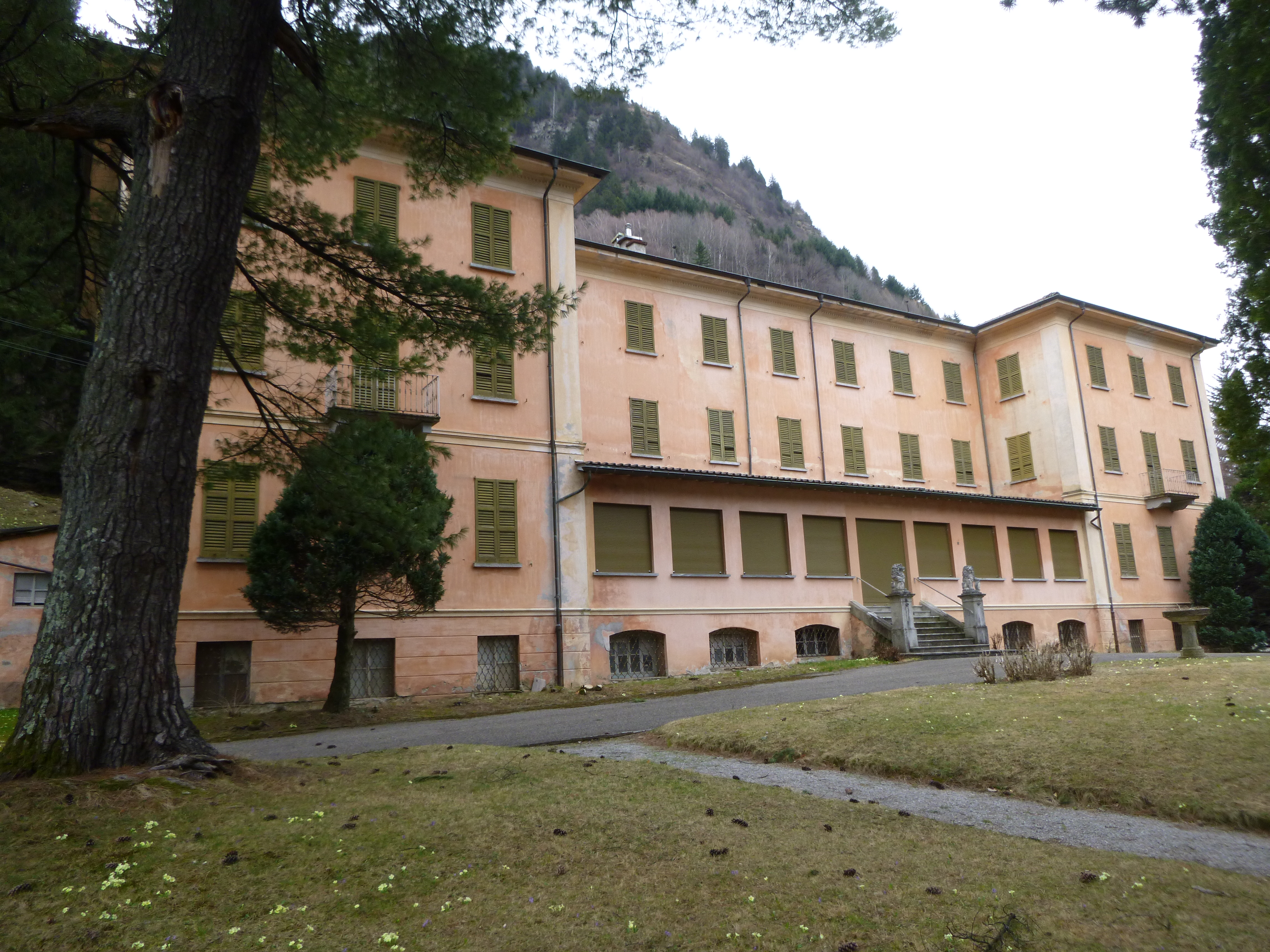 Frontseite des Kurhotels von Acquarossa mit Park